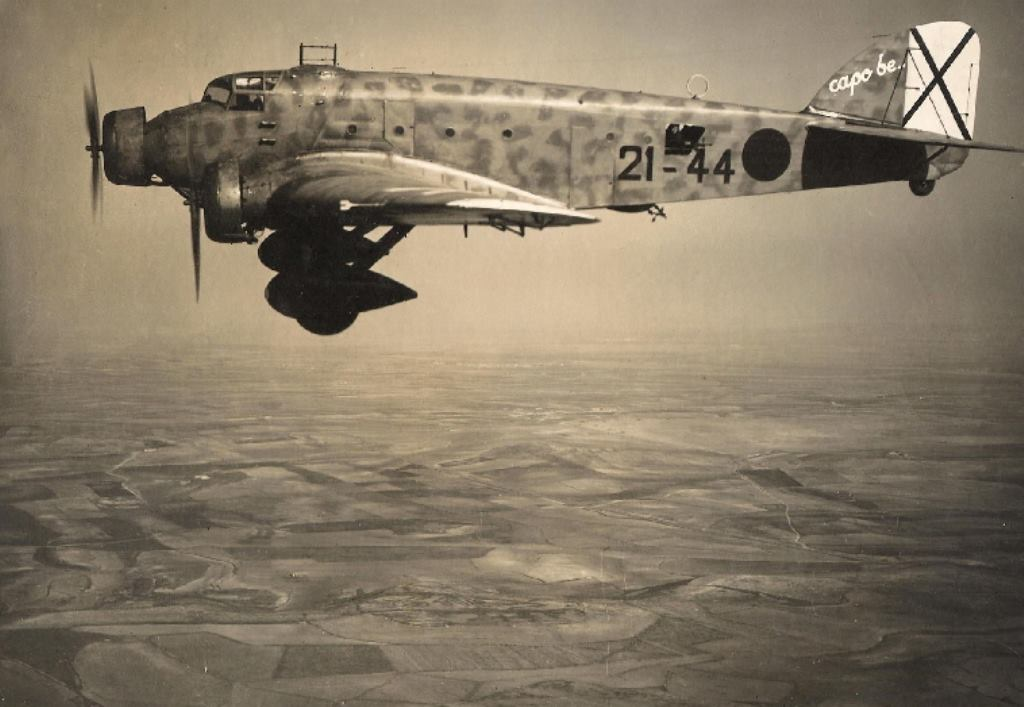 Savoia Marchetti SM.81 sorvolo in Spagna